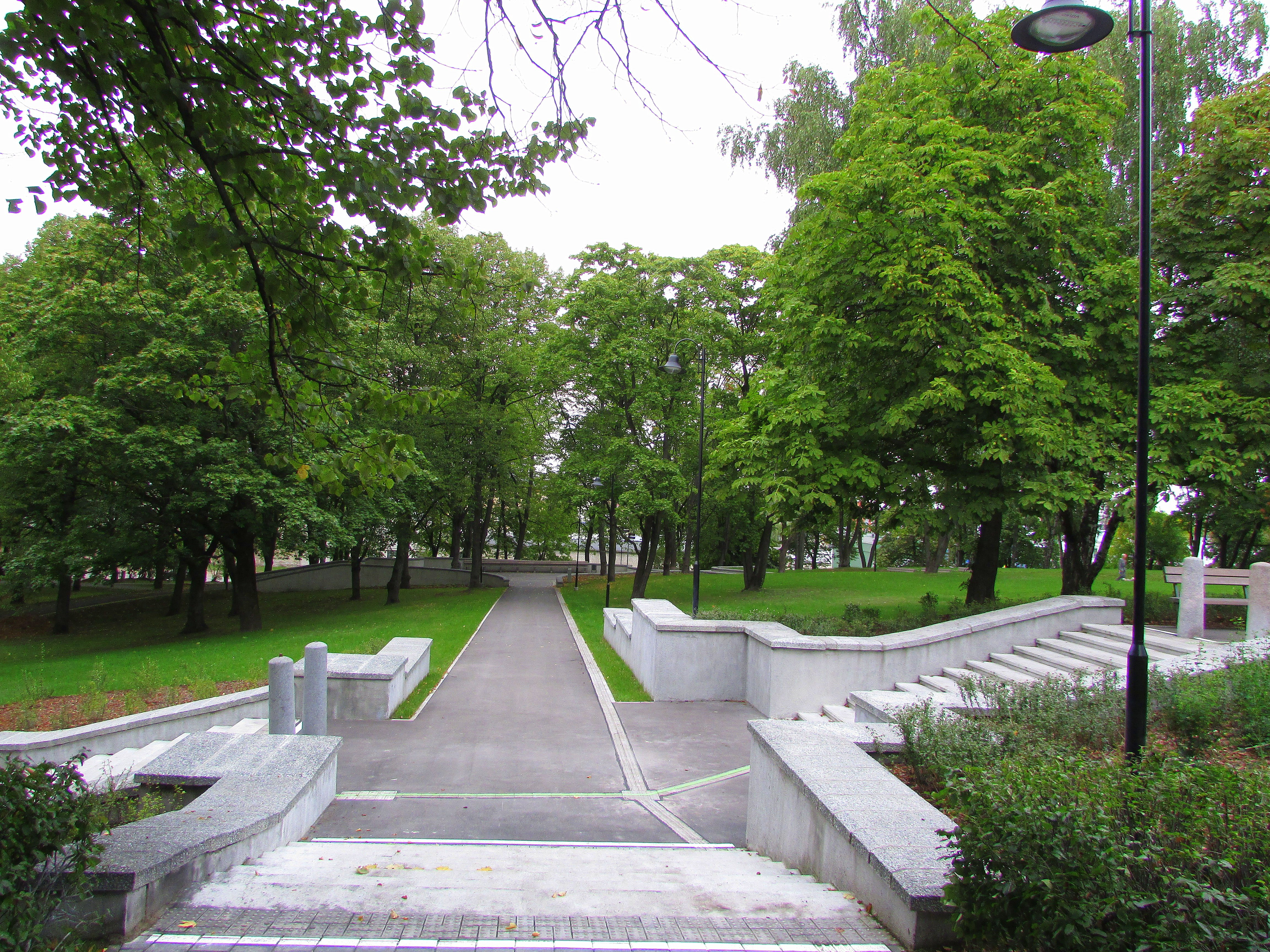 Grīziņkalna parks, Rīga, Pērnavas iela